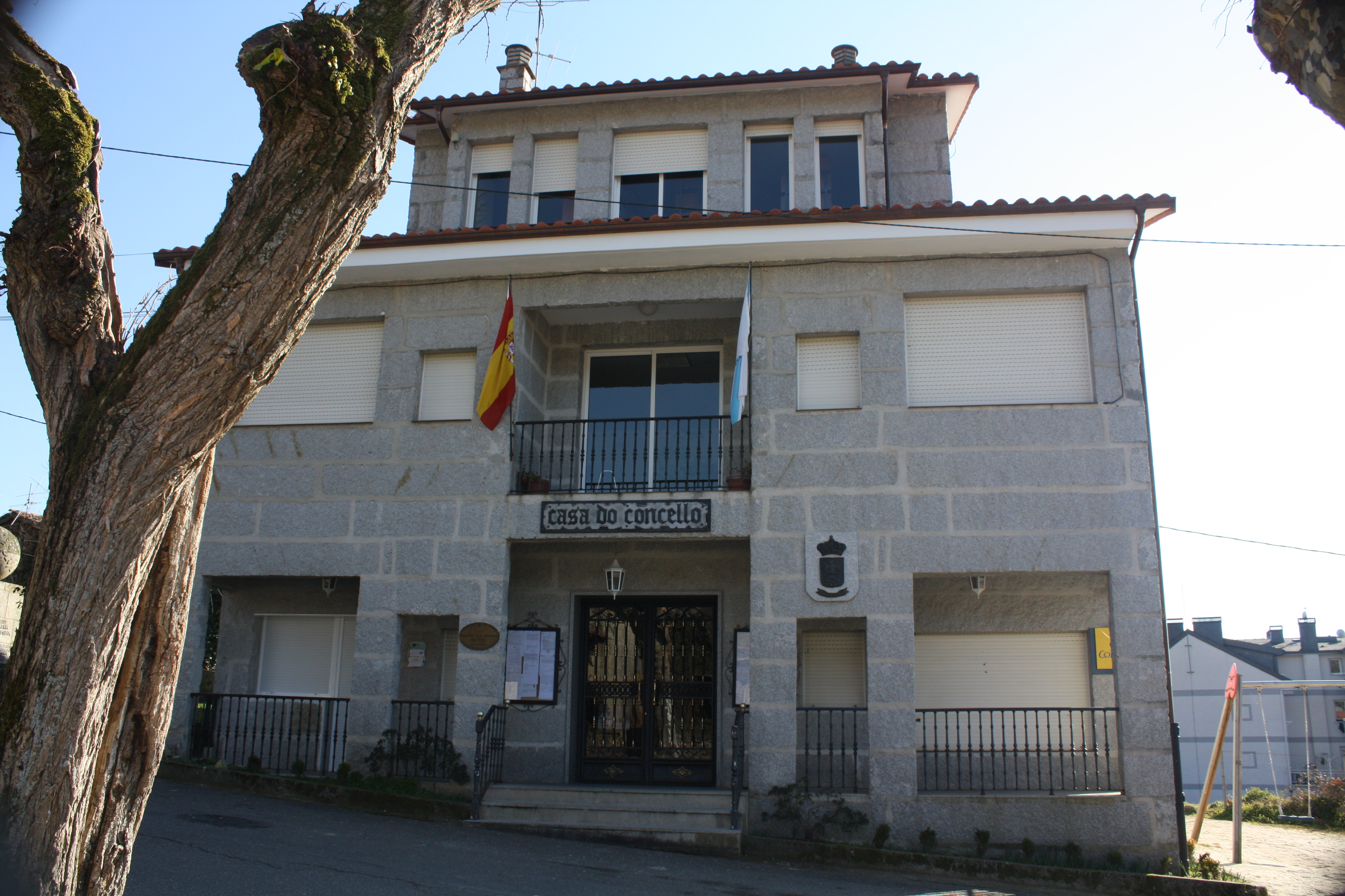 Casa do concello de Esgos (Ourense)